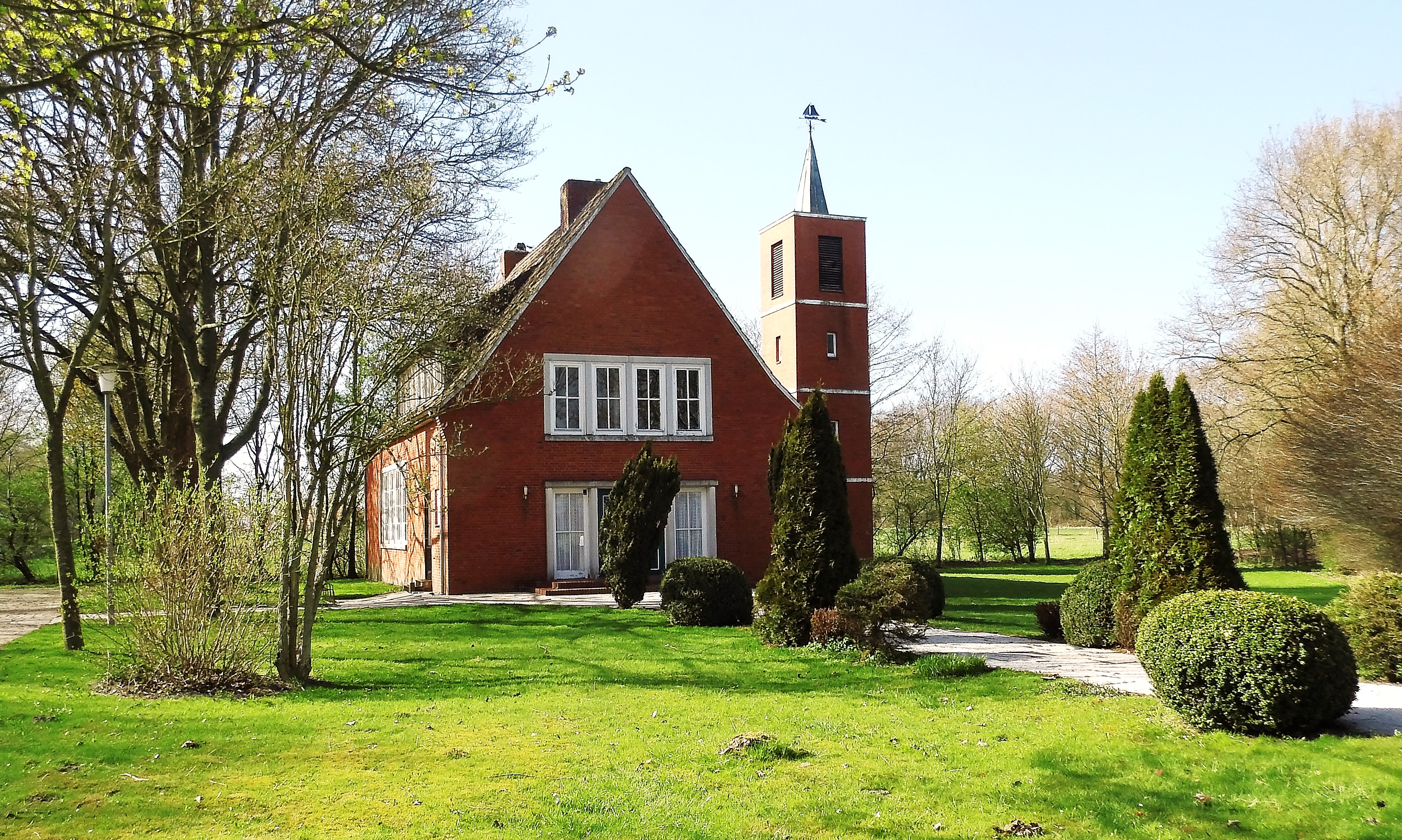 Evangelisch reformierte Kirche in Norden-Leybuchtpolder, Landkreis Aurich, Niedersachsen, Deutschland